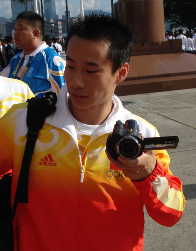 Xiao Qin